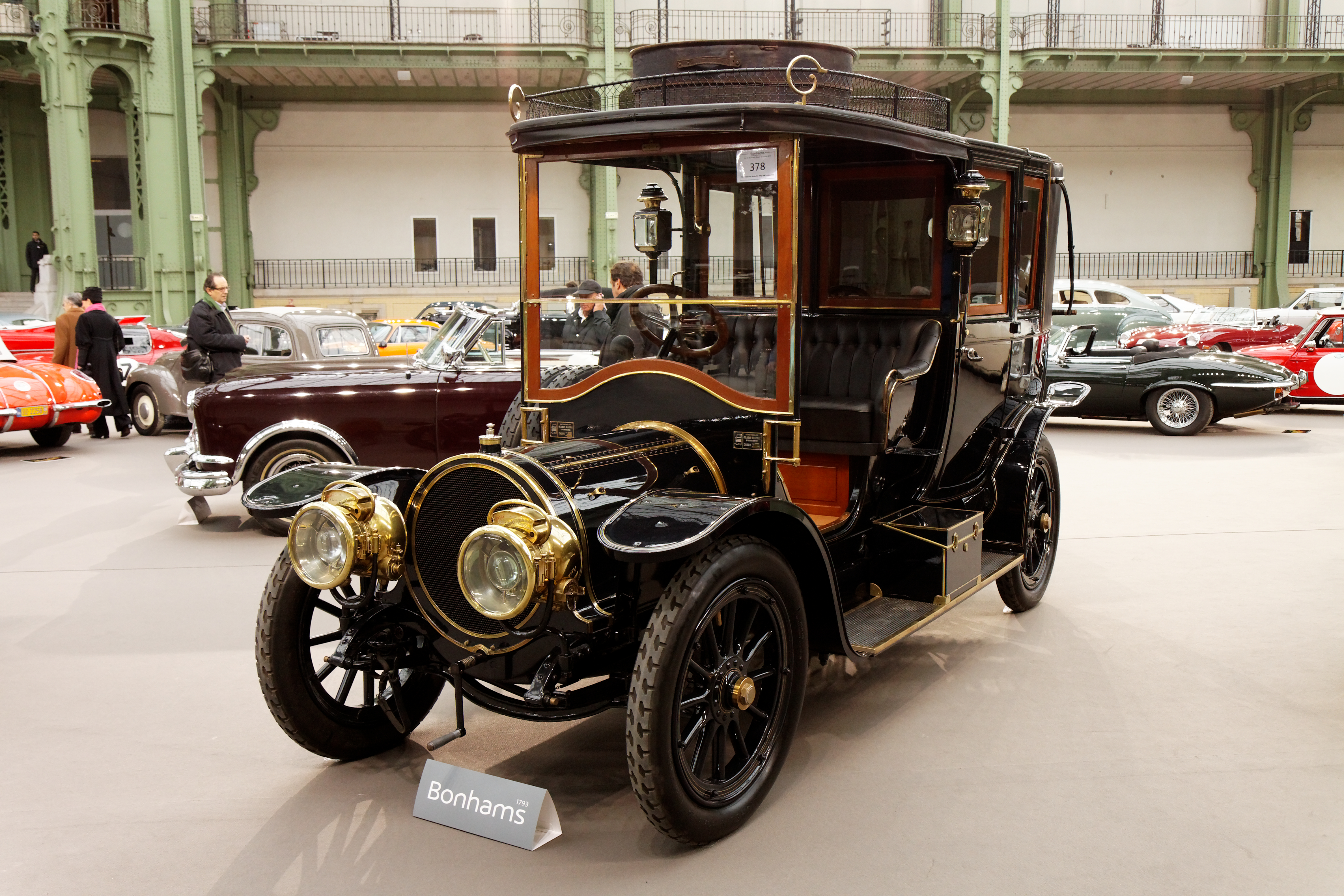 Delaunay-Belleville Landaulette1911 Delaunay-Belleville 25hp HB6 Landaulette Chassis no. 4148 Engine no. 4148V